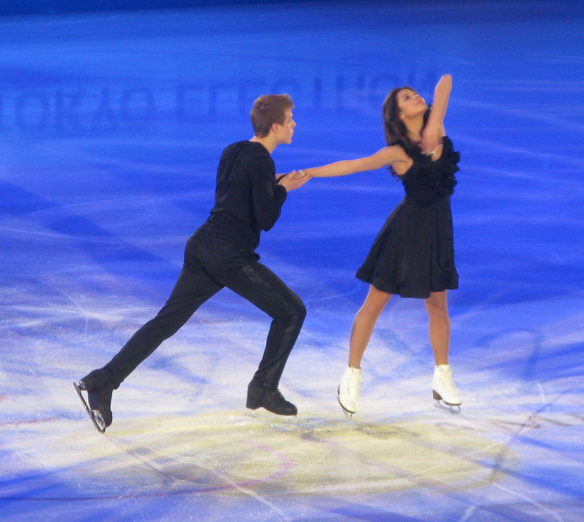 Elena Ilinykh et Nikita Katsalapov au gala des Championnats du monde de patinage artistique 2012 à Nice.